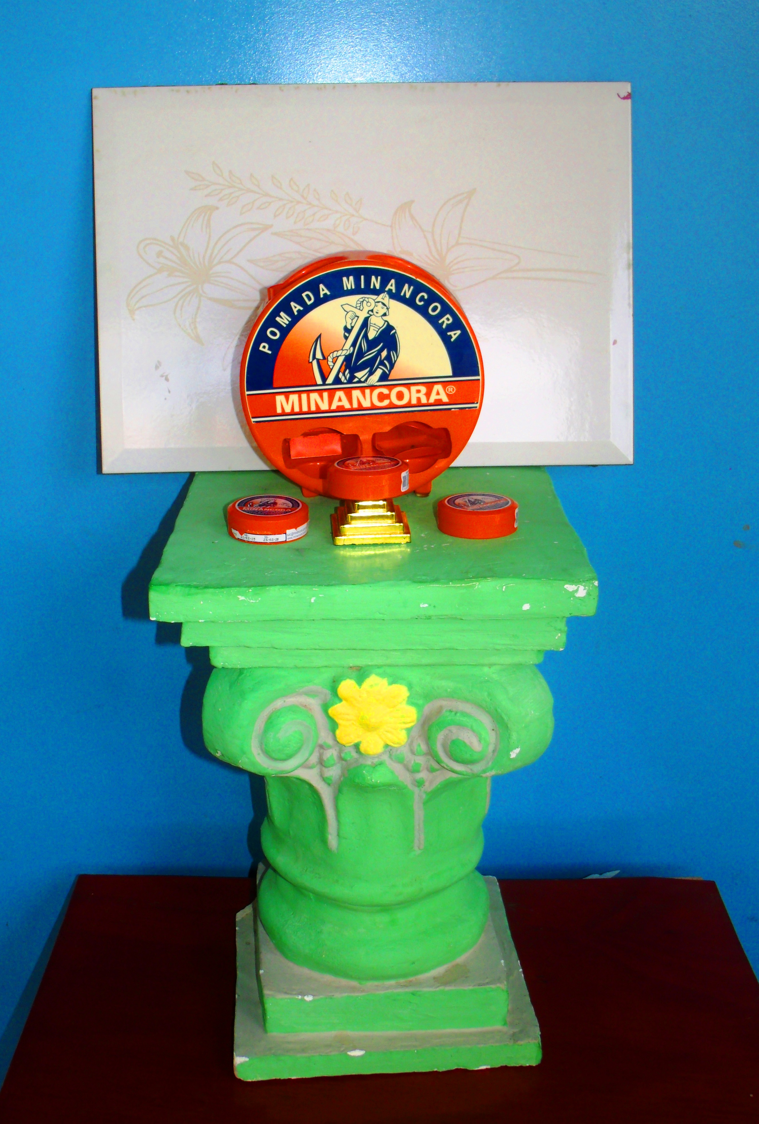 Monumentinho de uma exposição sobre a pomada minancora.